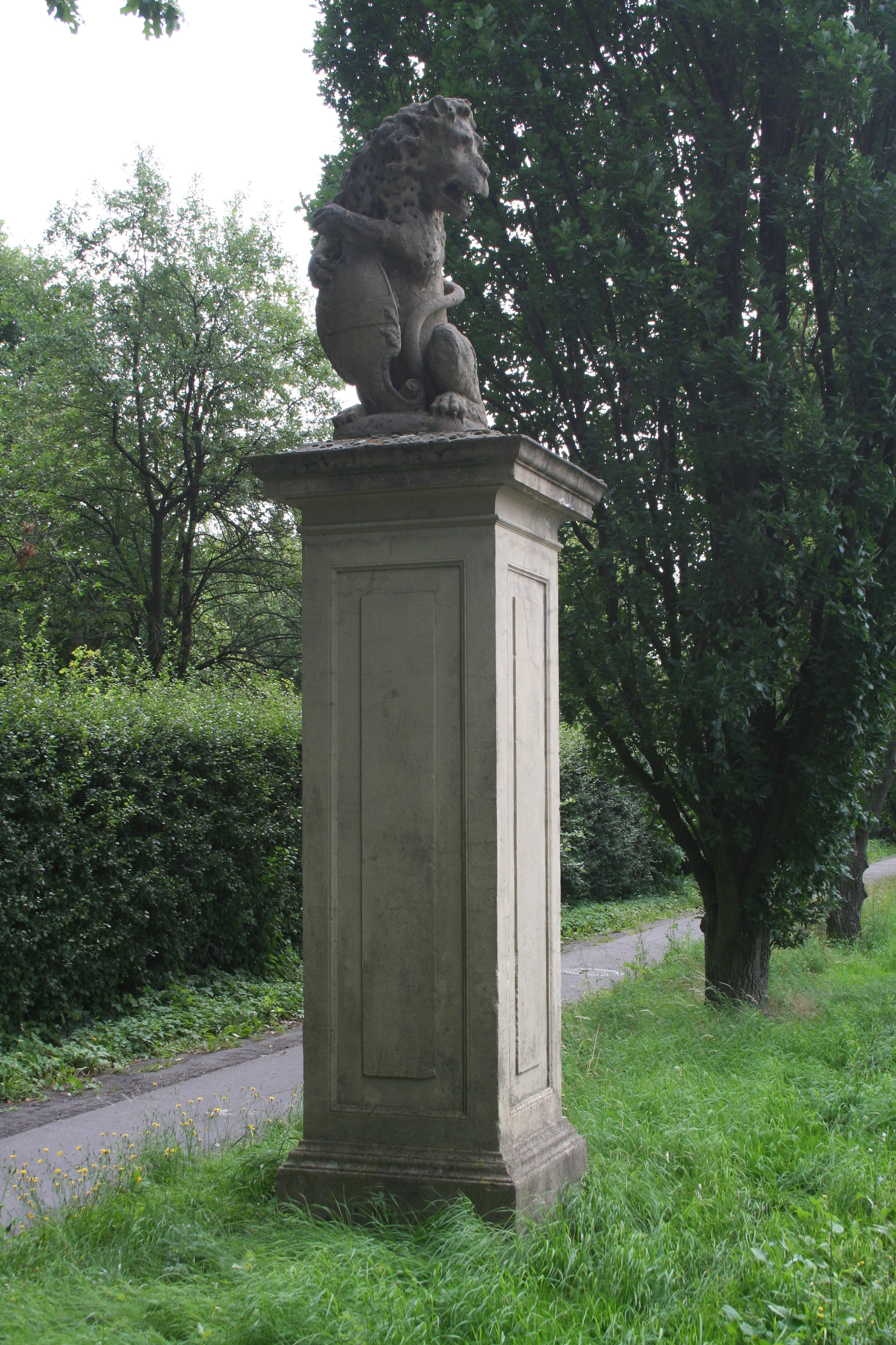 Löwe auf der Zufahrt zu Schloß Cappenberg